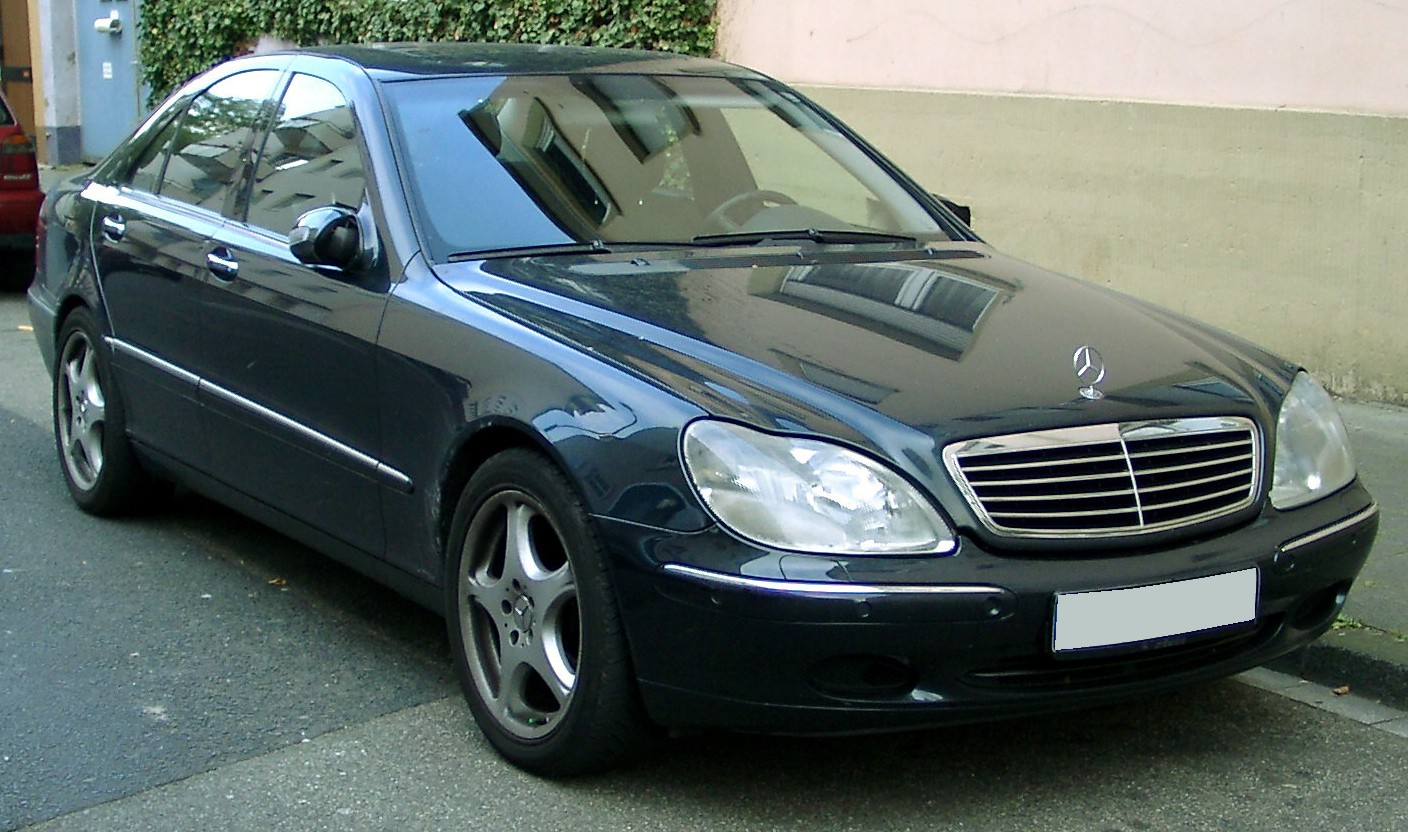 Mercedes-Benz W220